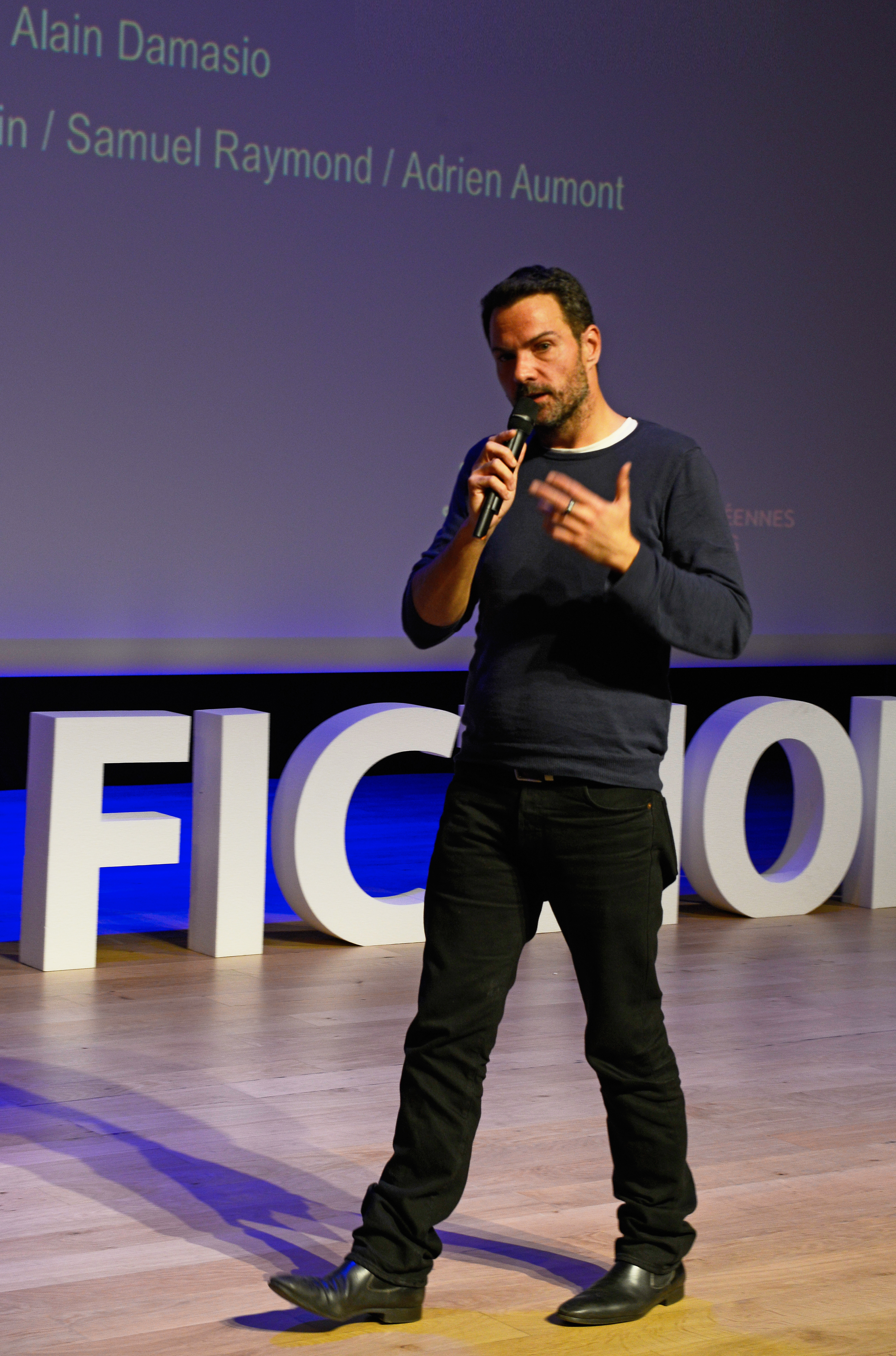 Jérôme Kerviel Finance-Fiction Popfinance Crowdfunding